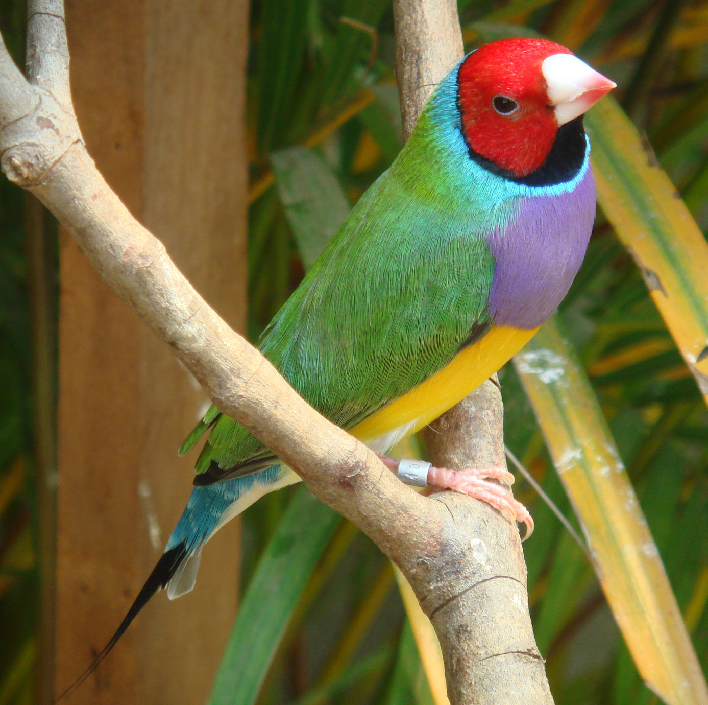 Erythrura gouldiae, gouldian finch